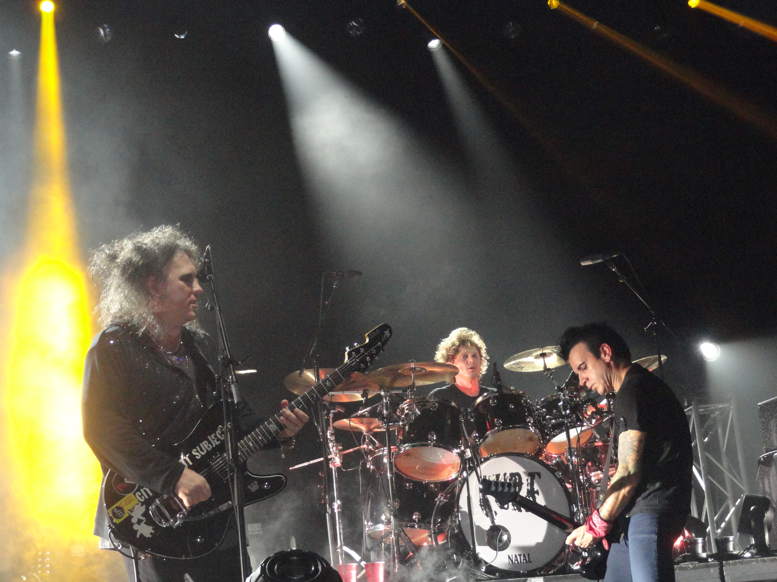 Robert Smith, Jason Cooper and Simmon Gallup